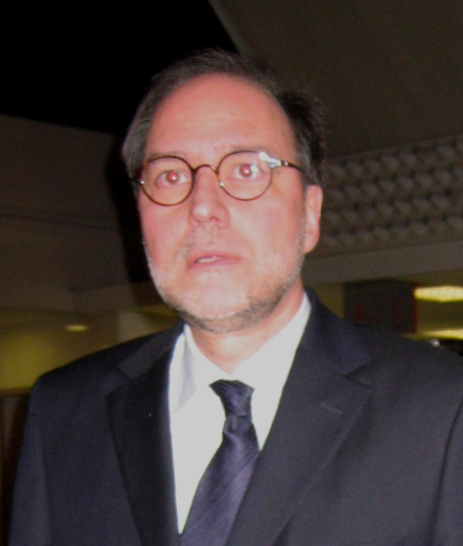 Mitja Gaspari, slovenian economist